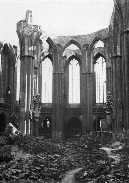 Berlin, Nikolaikirche, Ruine, Trümmer Aufn.: Illus Kümpfel 25.1.1951 Buntmetalldiebe als Leichenfledderer. In der Nicolaikirche, einem historischen Bauwerk des alten Berlin, befinden sich viele künstlerisch bedeutsame Grabkapellen und Epitophe. Mitte Januar 1951 wurde entdeckt, dass Buntmetalldiebe in den Grabkammern ihr Unwesen getrieben und zahlreiche Särge geplündert hatten. Zinksärge, Schmuck usw. wurden gestohlen. Es handelt sich meist um hier bestattete Ratsherren und Kaufleute aus dem 16.Jahrhundert. UBz: Das Innere der Kirchenruine. Im Hintergrund die Eingänge zu den Grabkammern. Information added by Wikimedia users.